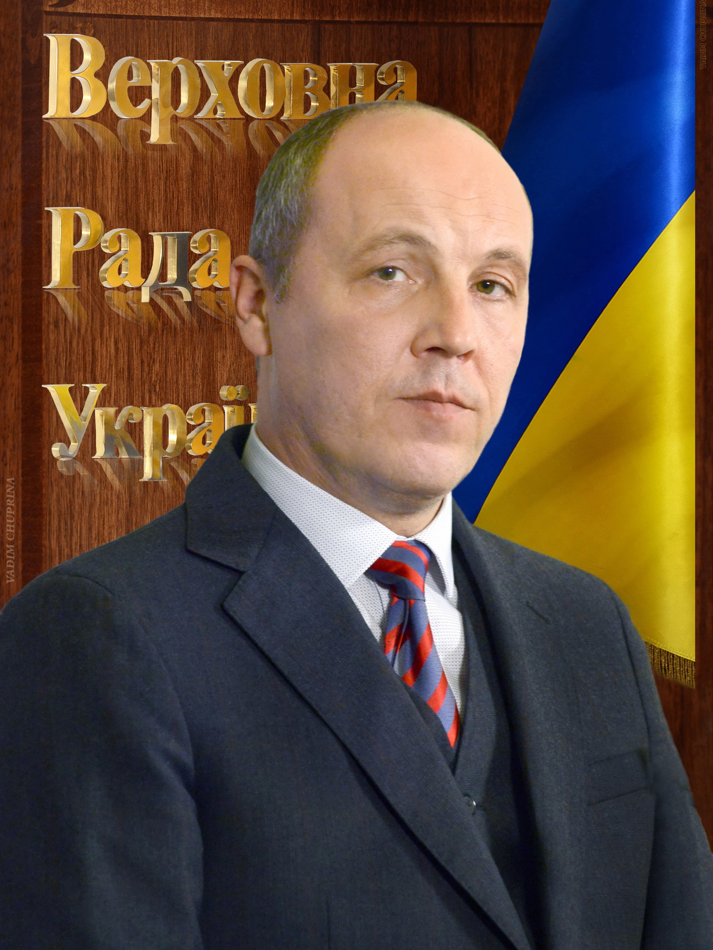 Парубій Андрій Володимирович 2016,фото Чуприны Вадима